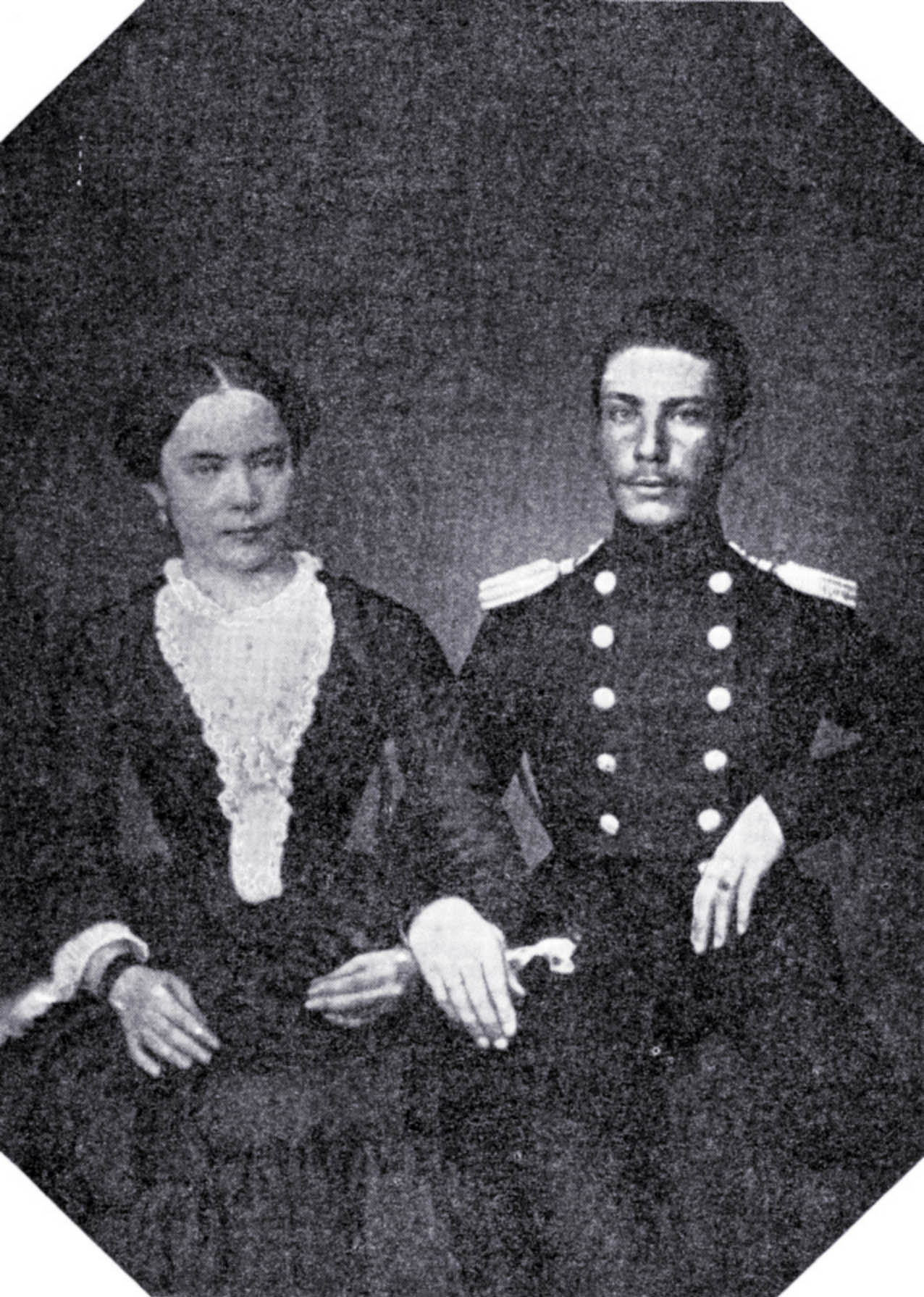 Беларуская (тарашкевіца): Партрэт Рамуальда Траўгута з жонкай Ганнай Пікель (Hanna Pikiel)